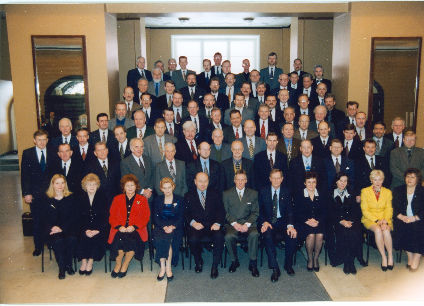 VIII Riigikogu koosseisu lõpupilt.